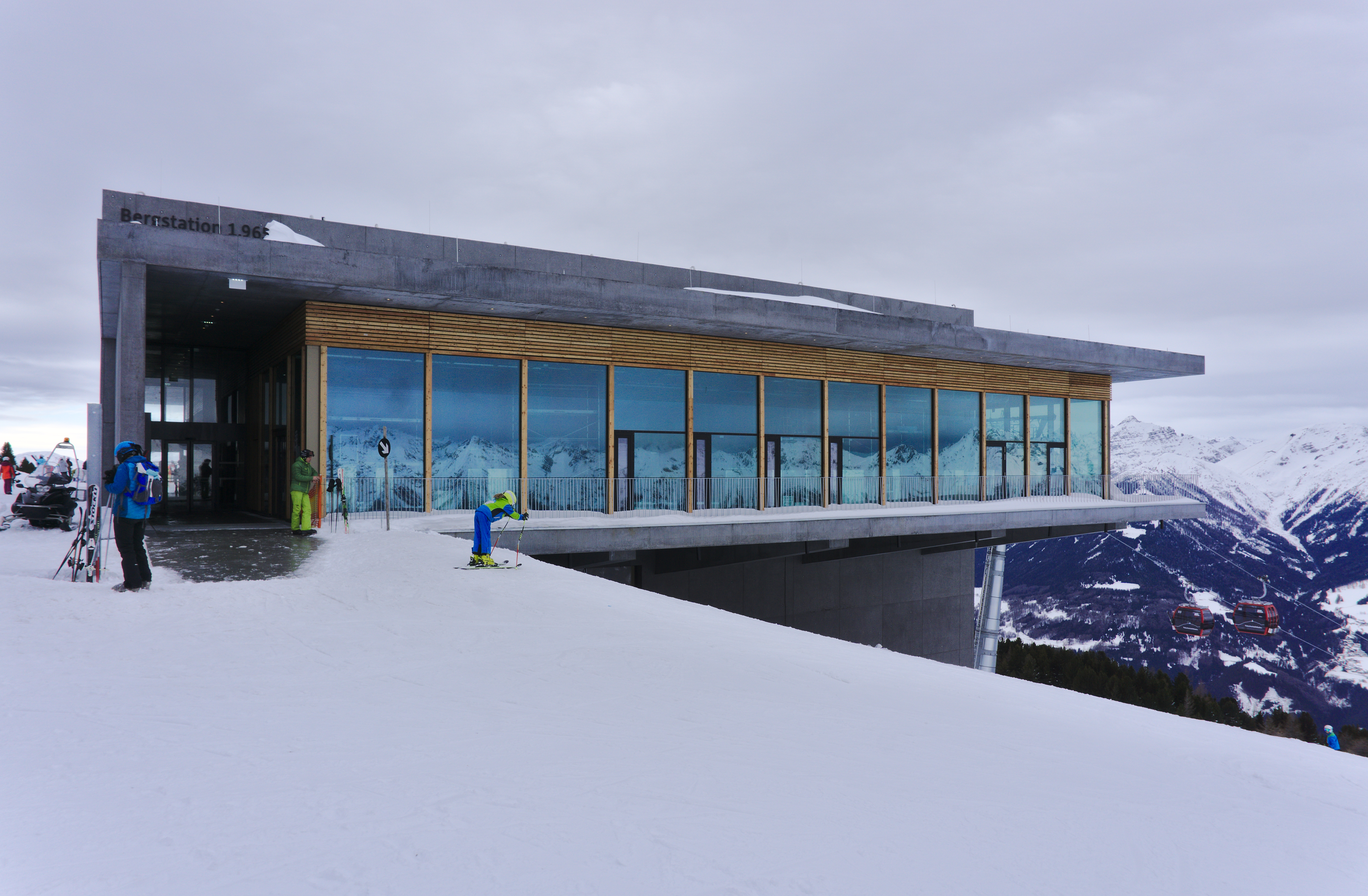 Bergstation der neuen, seit 2017-12 betriebenen Patscherkofelbahn, 1965 m ü.A., Nordseite